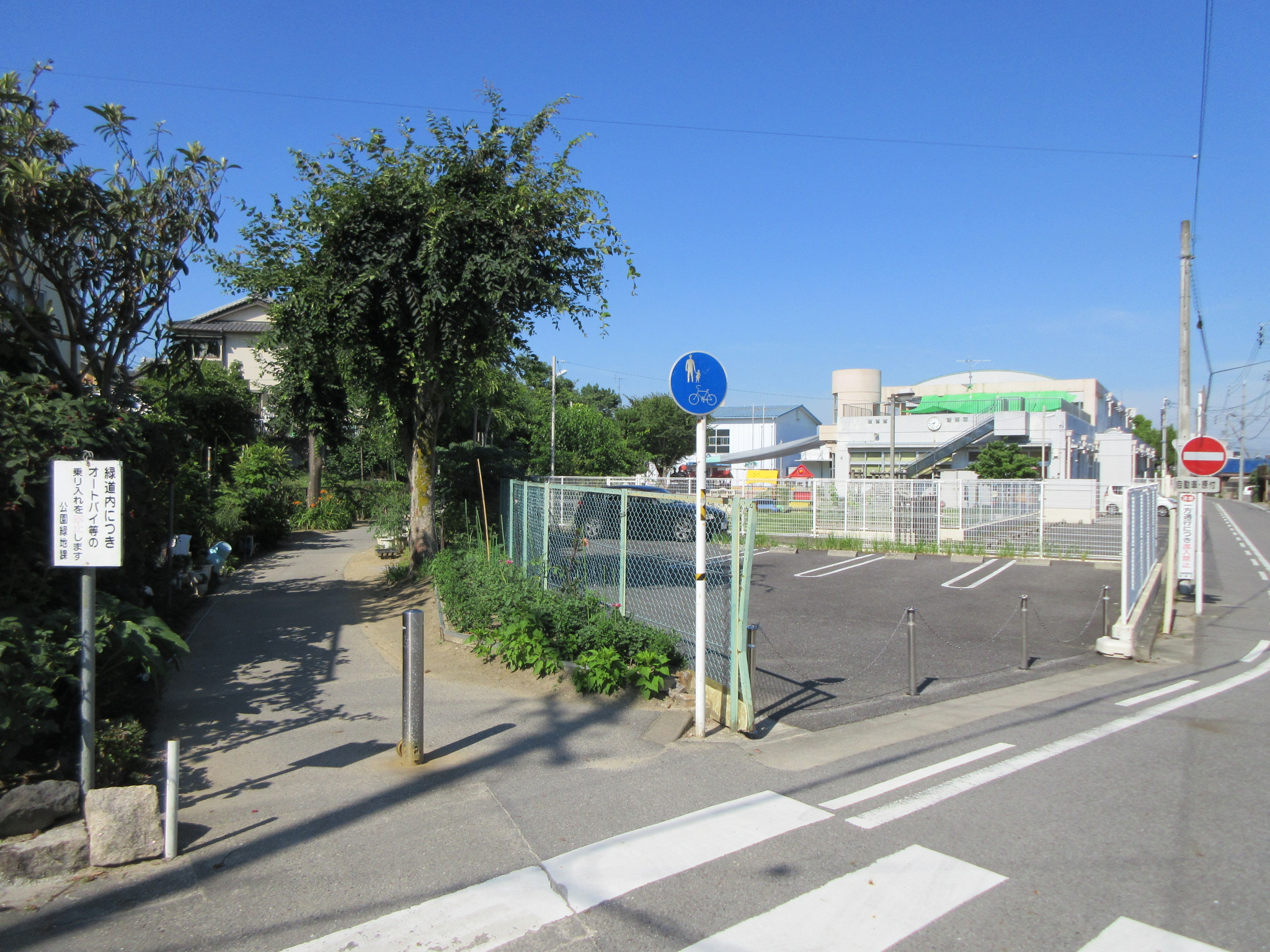 岡崎市立広幡こども園